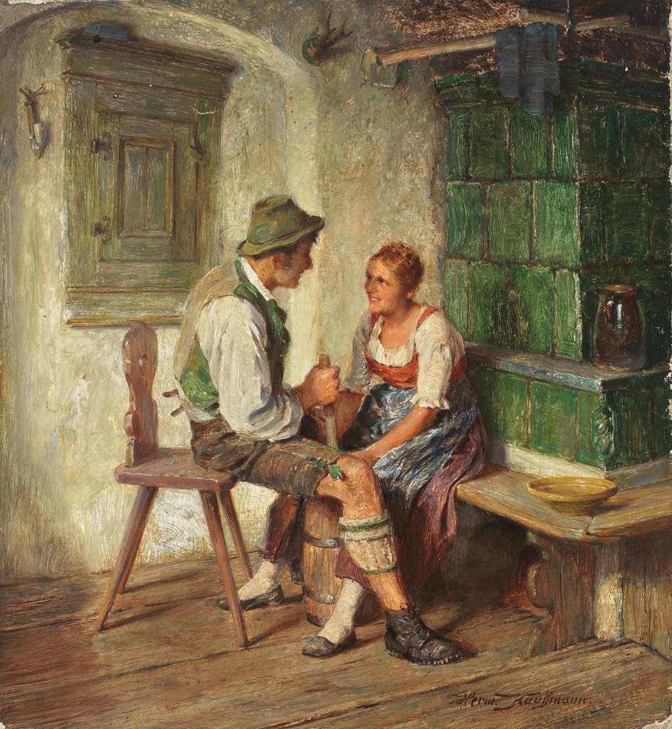 Tändelndes Paar beim Buttern in der Stube. Öl auf Leinwand, 22 x 20 cm